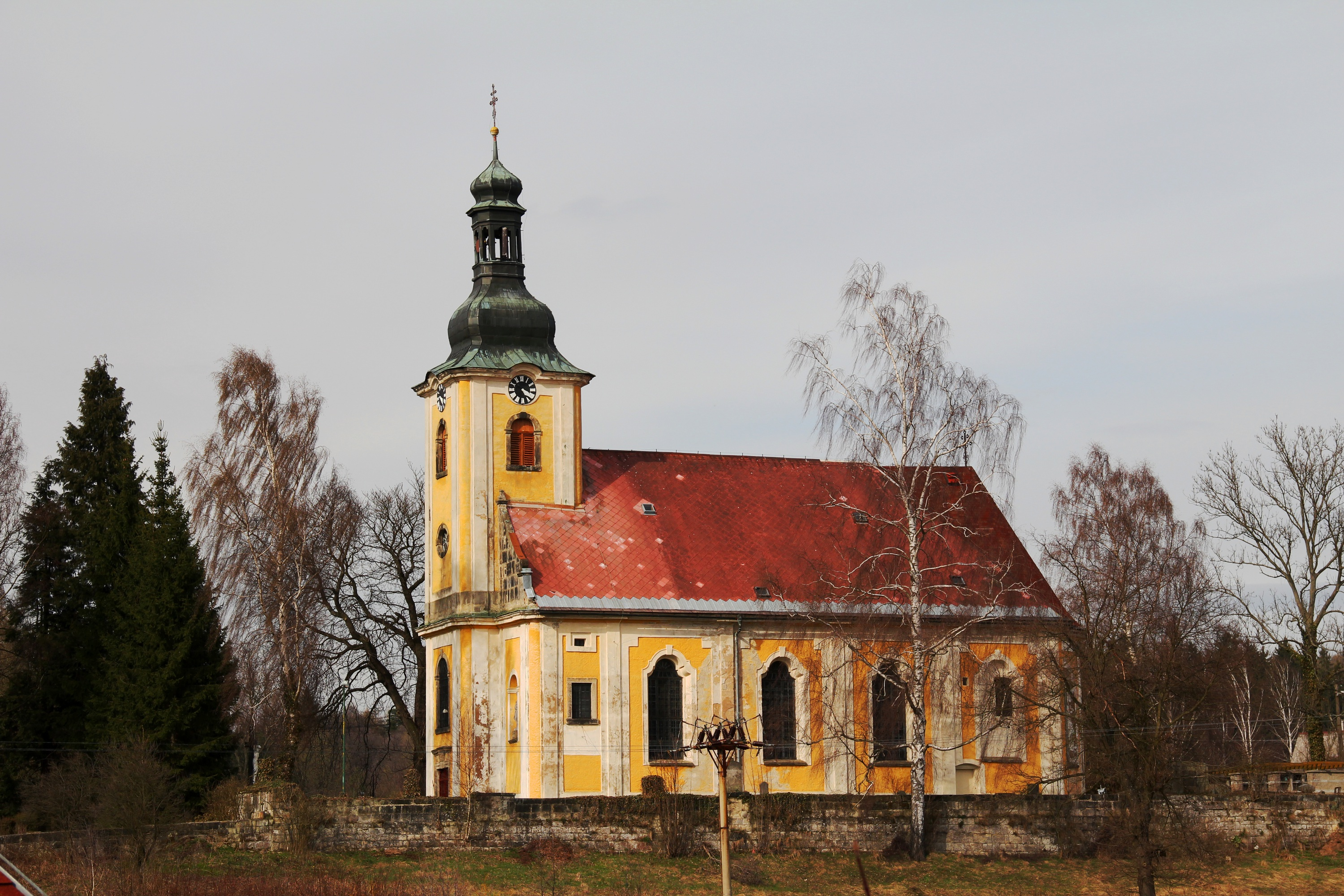 kościół pw. Wniebowzięcia NMP w Doubicach